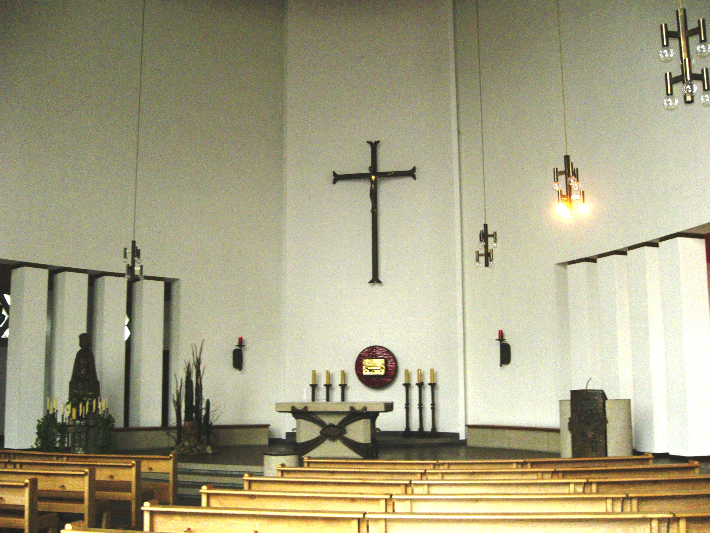 Altarraum der im Jahr 1957/58 errichteten Klosterkirche Maria Königin bei Altenhundem